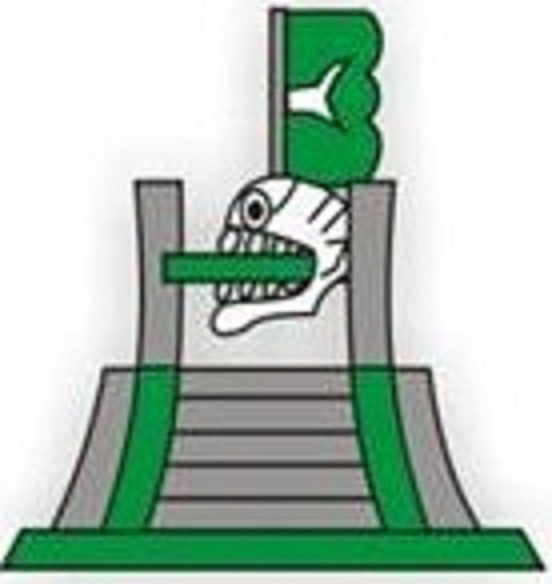 Escudo Zumpahuacán